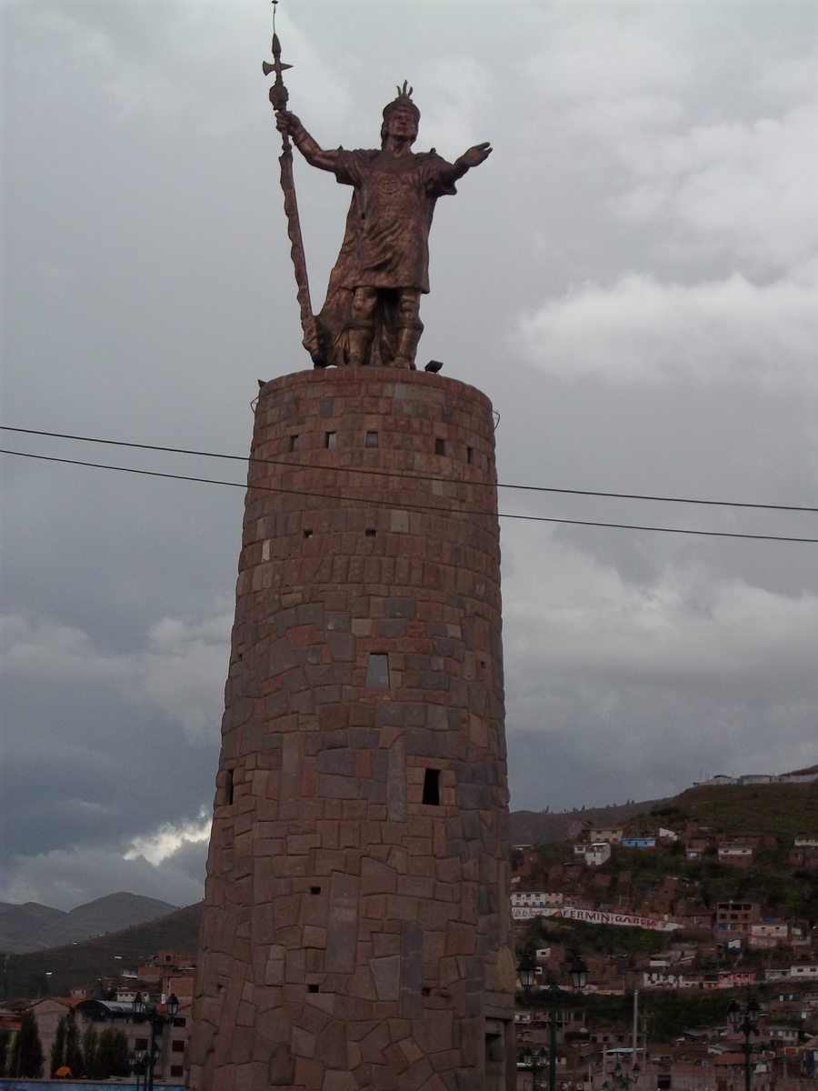 Torre con monumento al Inca Pachacutec en el Cusco, de varios pisos de altura, y un museo en su interior.